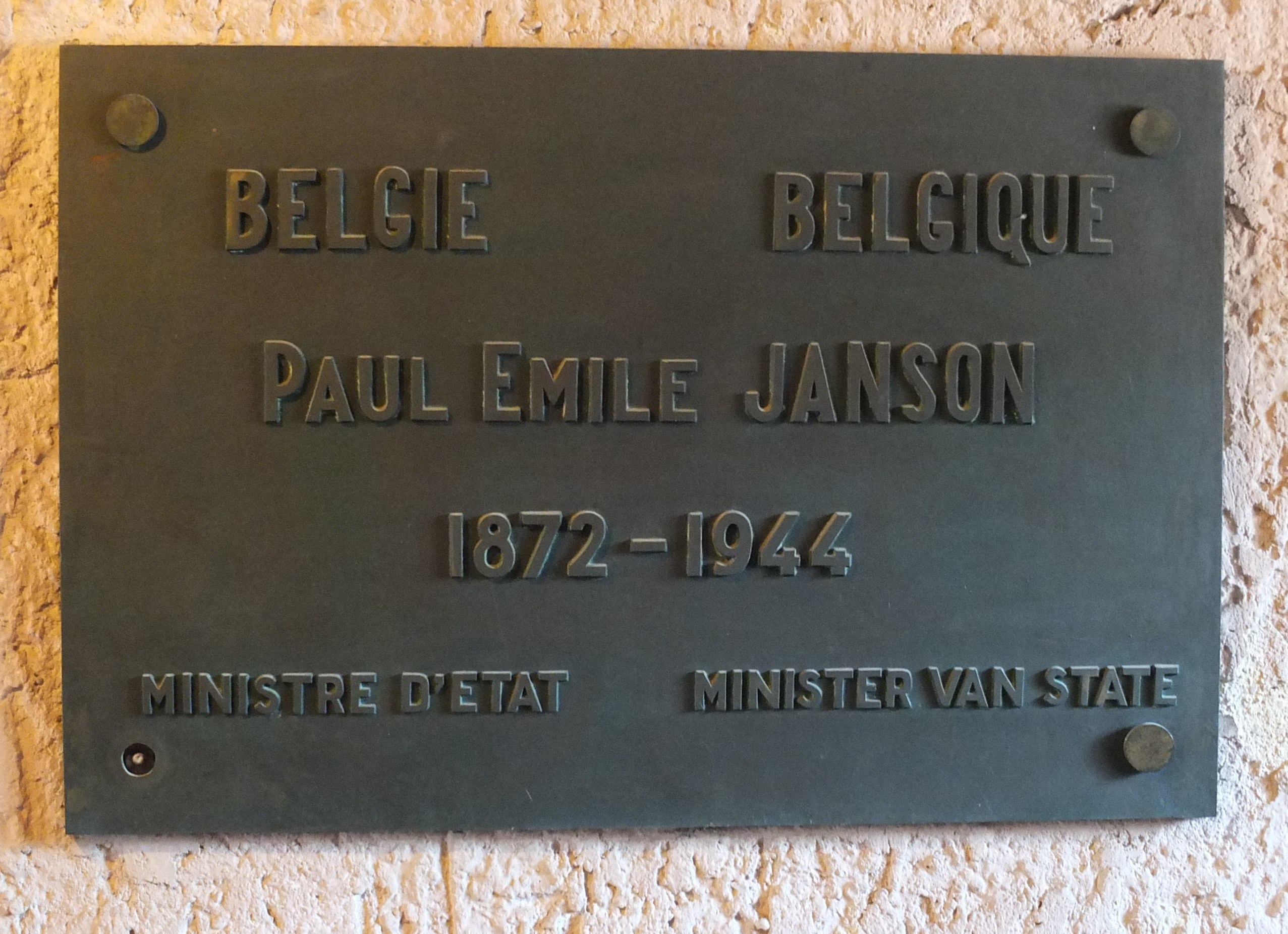 Gedenkplaat voor de in KZ Buchenwald overleden minister van staat en voormalige eerste minister Paul-Emile Janson